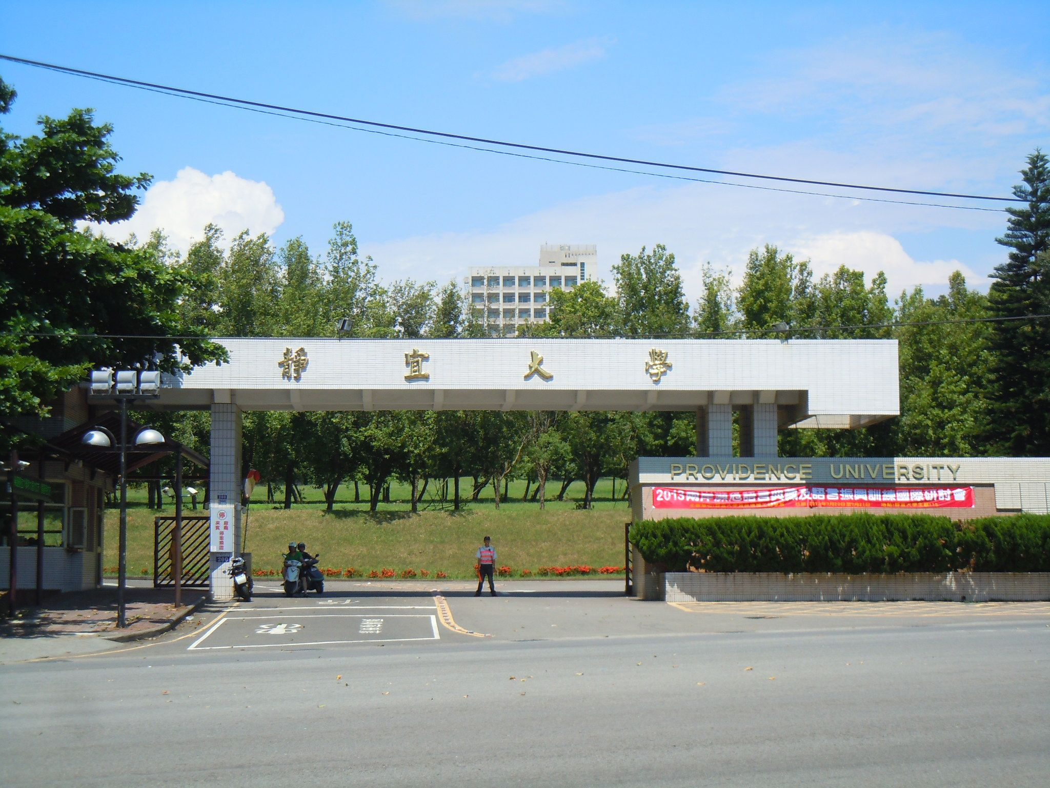 靜宜大學校門